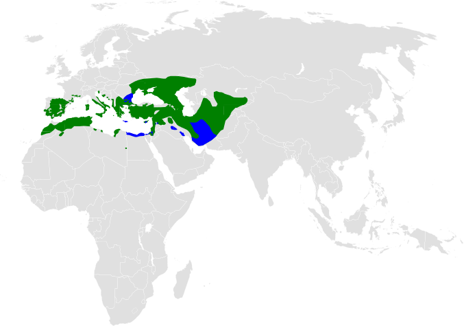 Melanocorypha calandra distribution map, based on